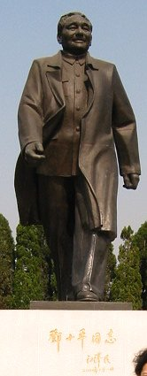 Description : Statue de Deng Xiaoping, dans le parc de Shenzhen surplombant la ville, en Chine. License : GNU FDL Auteur : User:Popolon (2001)